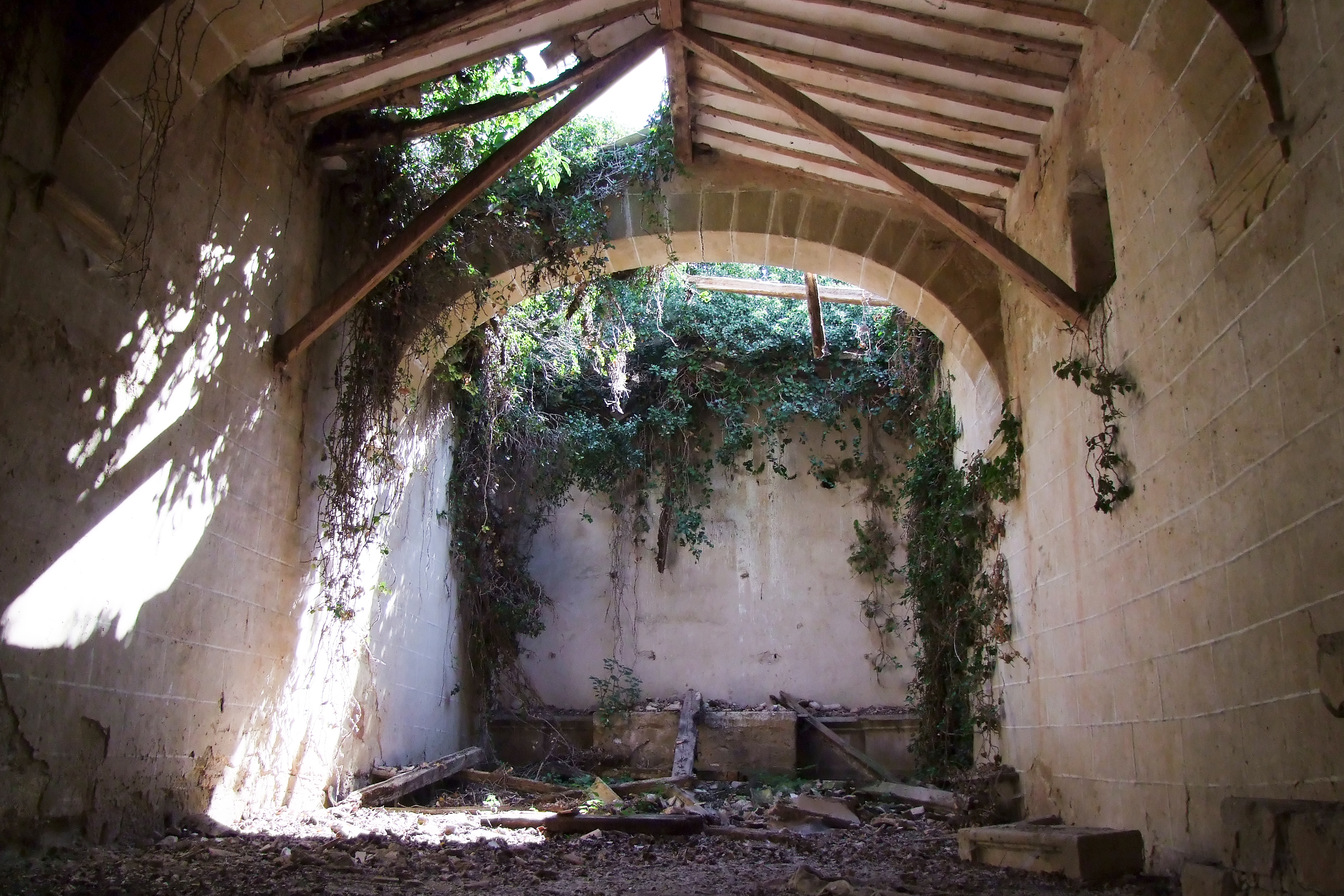 Ermita de San Andrés en la localidad de Briones, La Rioja - España